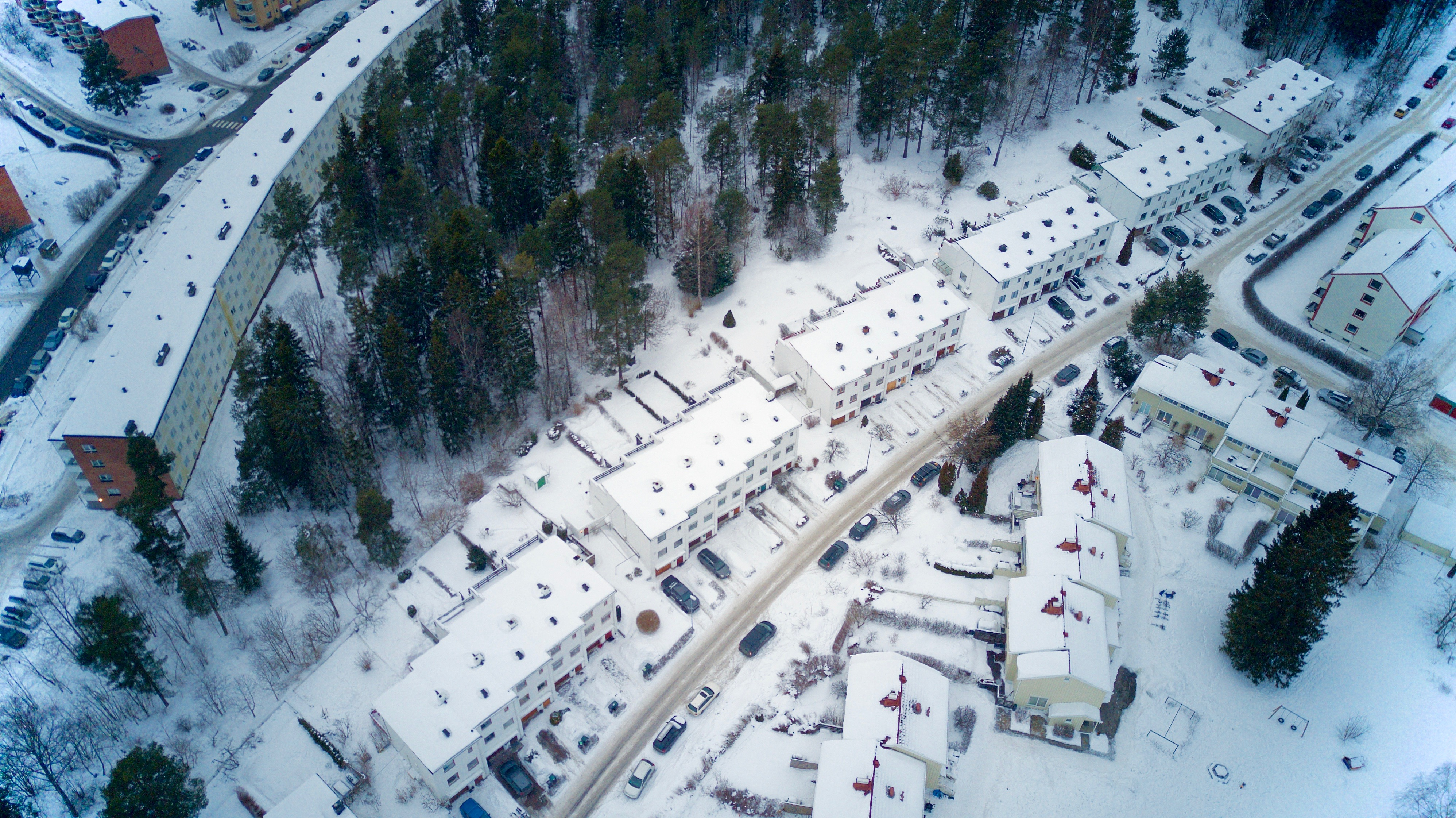 Rekkehus i Bølerskogen i Oslo, kjent som "politihusene".